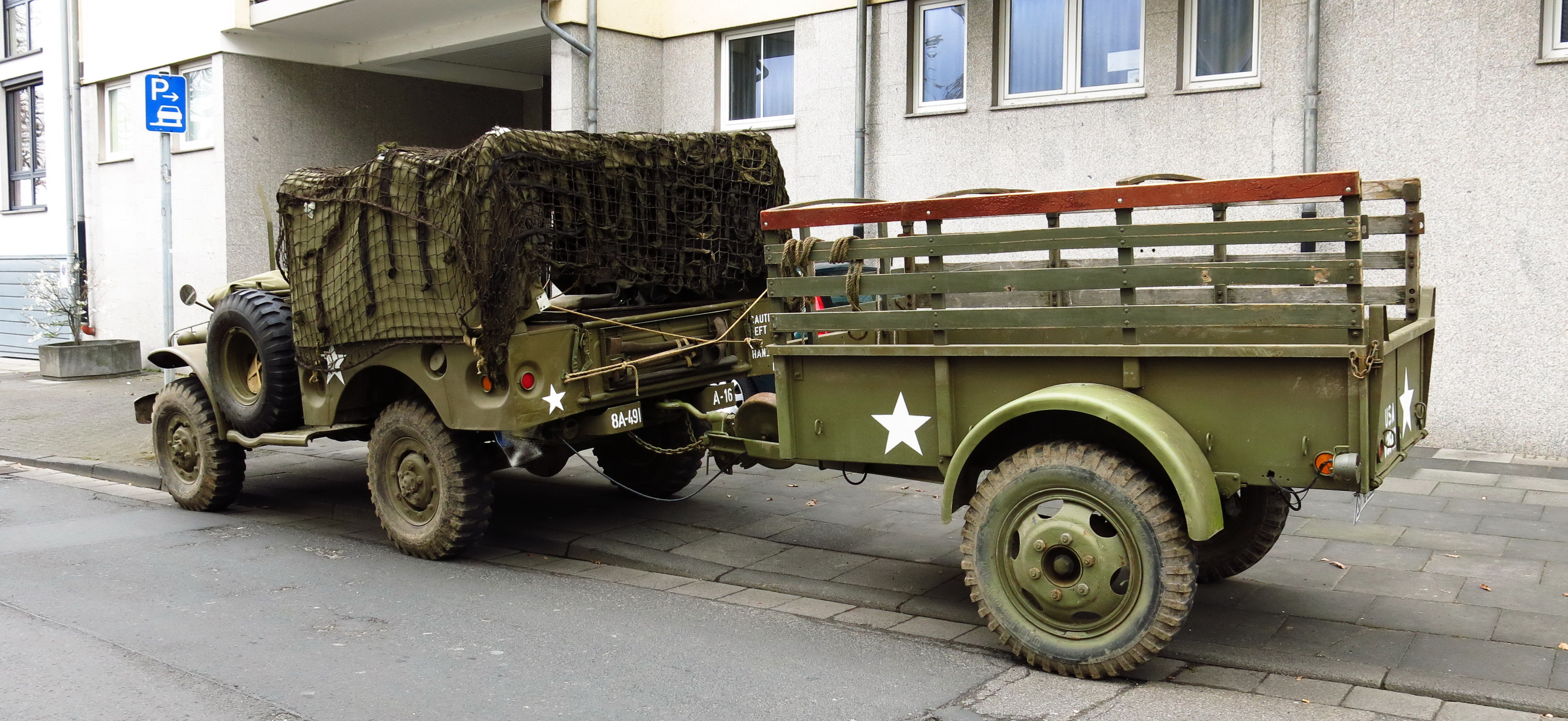 Jeep auf dem Oldtimertreffen "Beuel Classics" 2015 in Beuel.